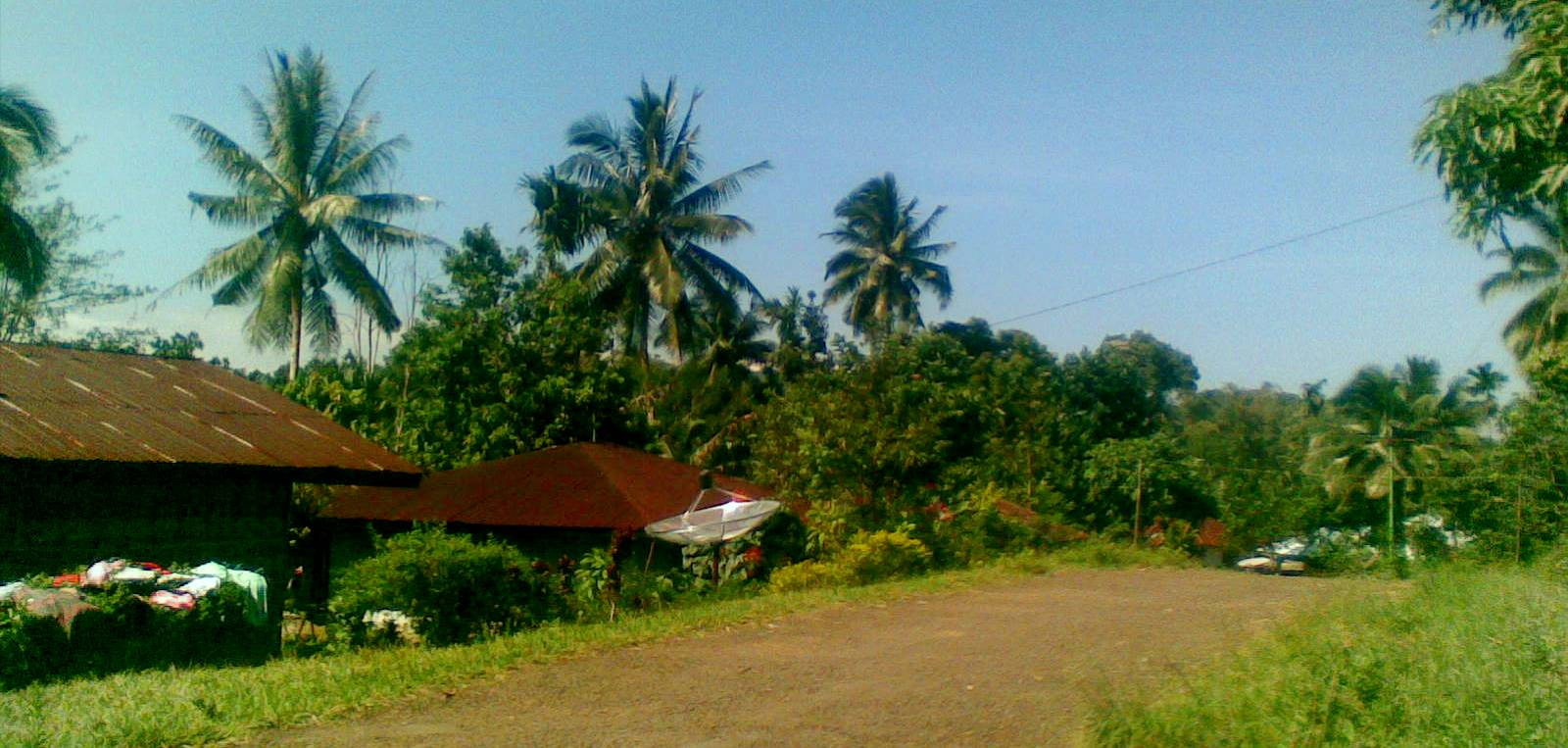 Foto ini diambil di Kampung Kondas:, Desa Tiwu Riwung(Etnis Kempo), Kecamatan Mbeliling, Manggarai Barat, Flores-Nusa Tenggara Timur,indonesia Indonesia. Jarak dari jalan raya trans flores sekitar 6 Km, bisa ditempuh dengan kendaraan umum(otto colt disel) bisa juga dengan sepeda motor(ojek) dengan waktu tempuh sekitar 1 jam perjalanan.